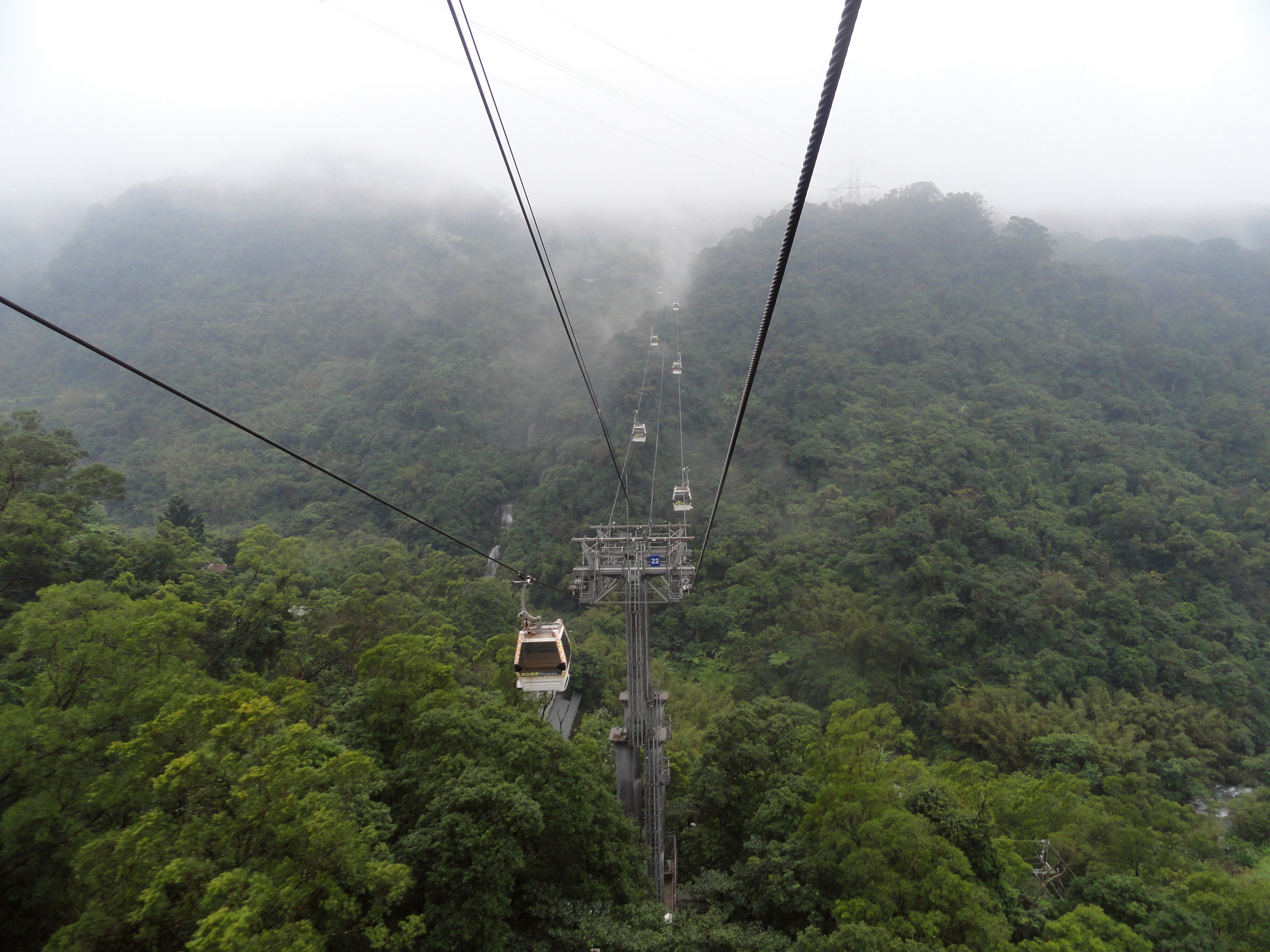 中文（中国大陆）: 台北猫空缆车线路。